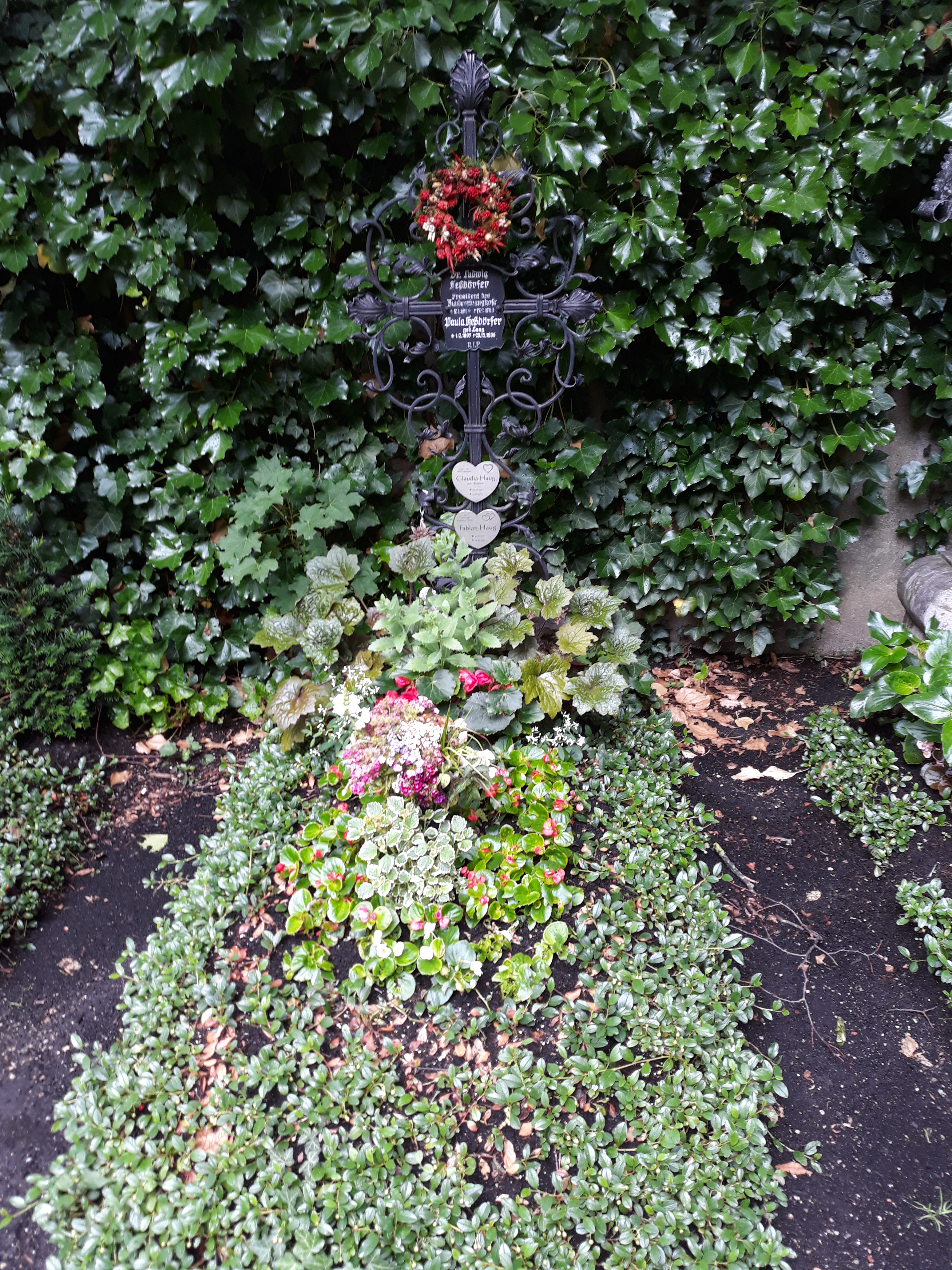 Das Grab des Präsidenten des Bundesfinanzhofs Ludwig Heßdörfer mit Ehefrau Paula, Tochter Claudia und Enkel Fabian auf dem Bogenhausener Friedhof in München.